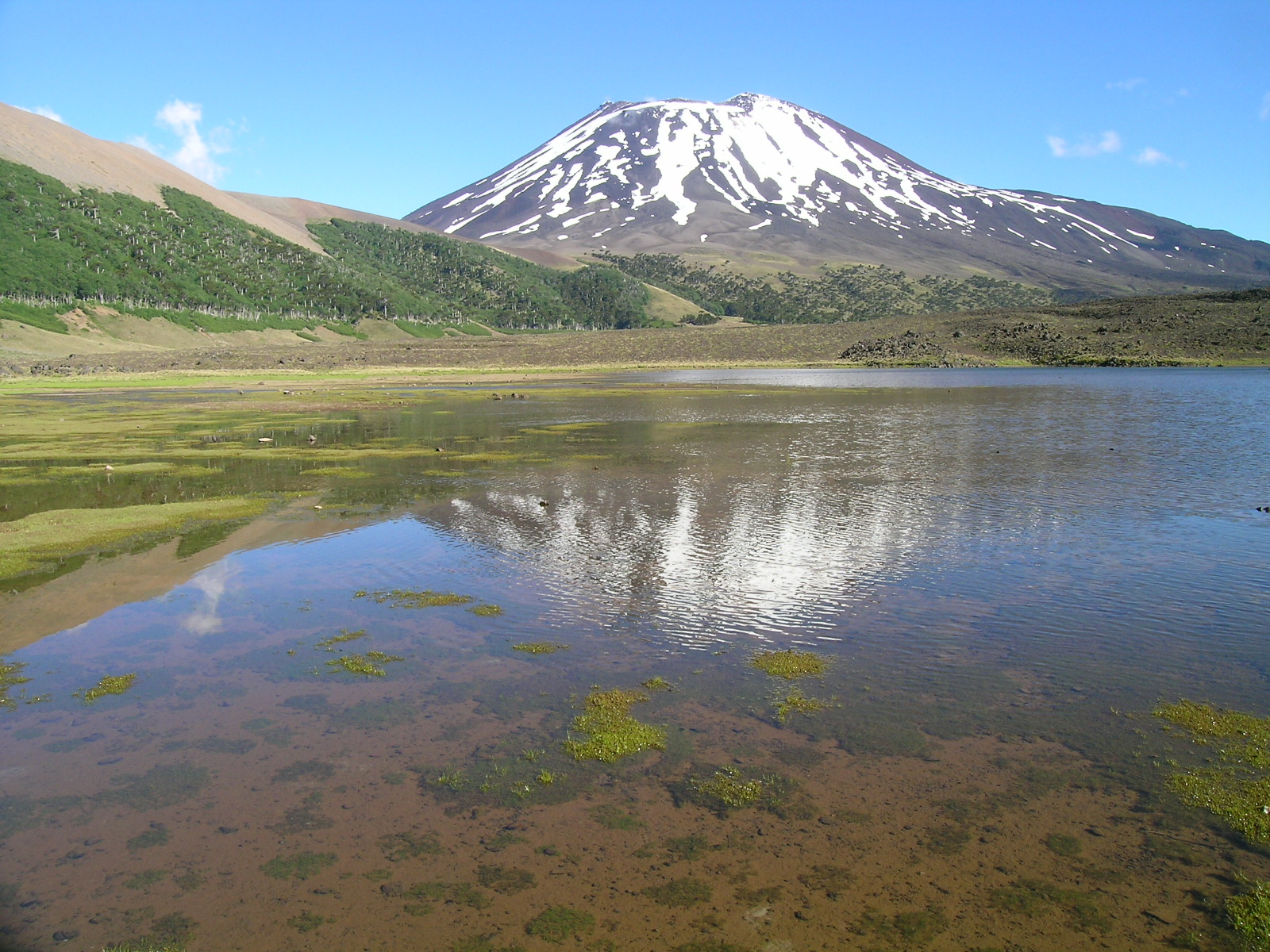 Lonquimay Volcano, Chile.